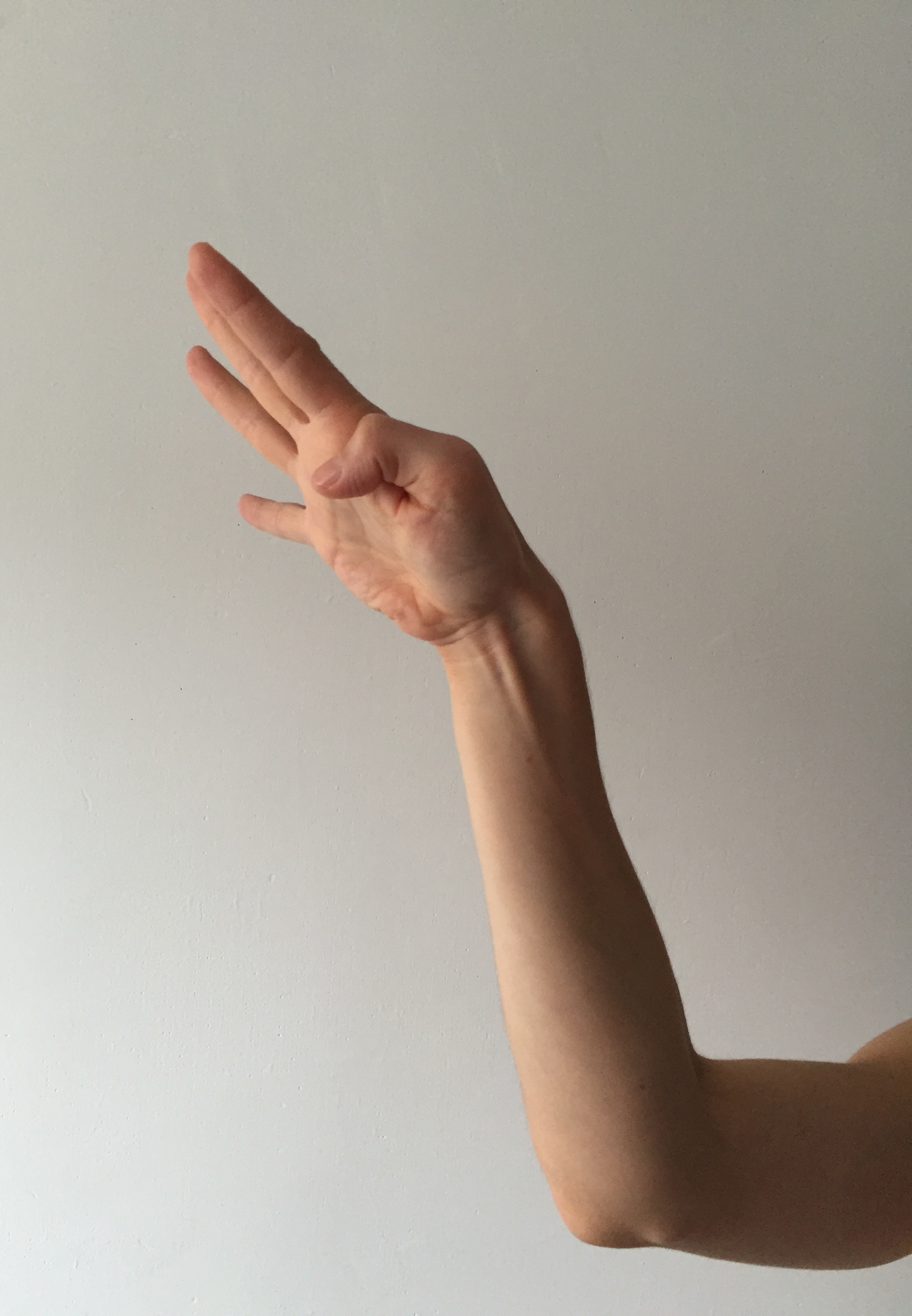 Style de l'aigle en Kung Fu